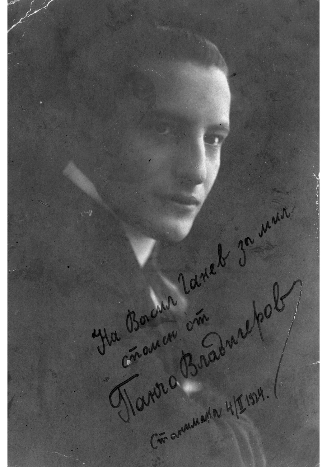 Снимка с посвещение на Панчо Владигеров на техните приятели Васил и Мария Ганеви, на които са били чести гости в дома на Димитър Янков Ганев (Ганеолу).